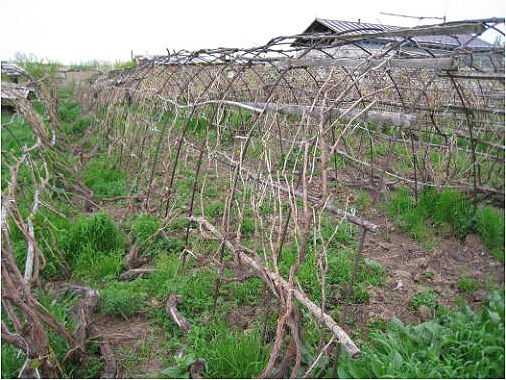 Tunnel Pergola aus Holzruten, Uzbekistan